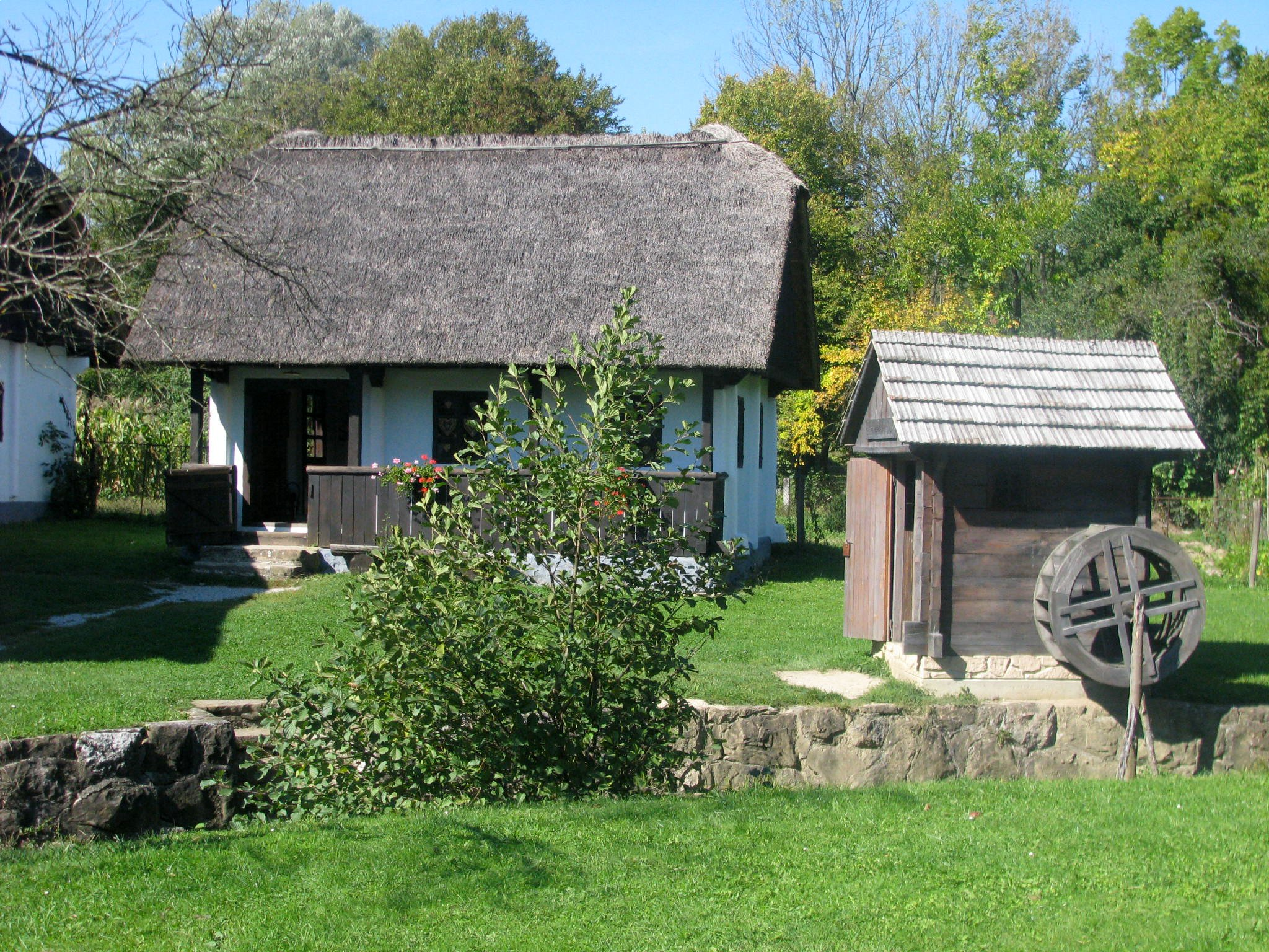 Stqaro selo, open air museum, Kumrovec, Croatia